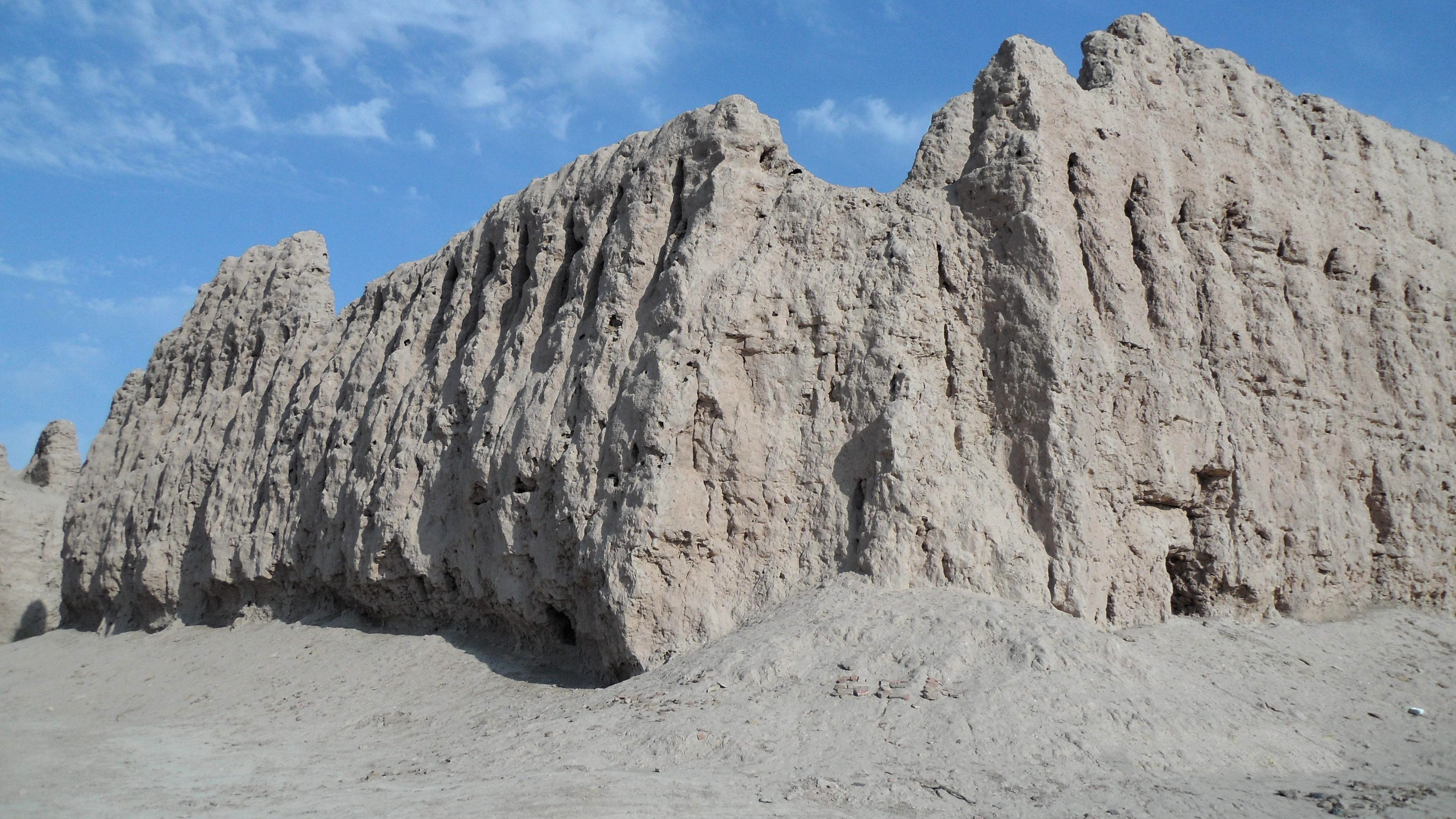 Ayaz Kale - Festung aus der Kuschanenzeit in Choresm